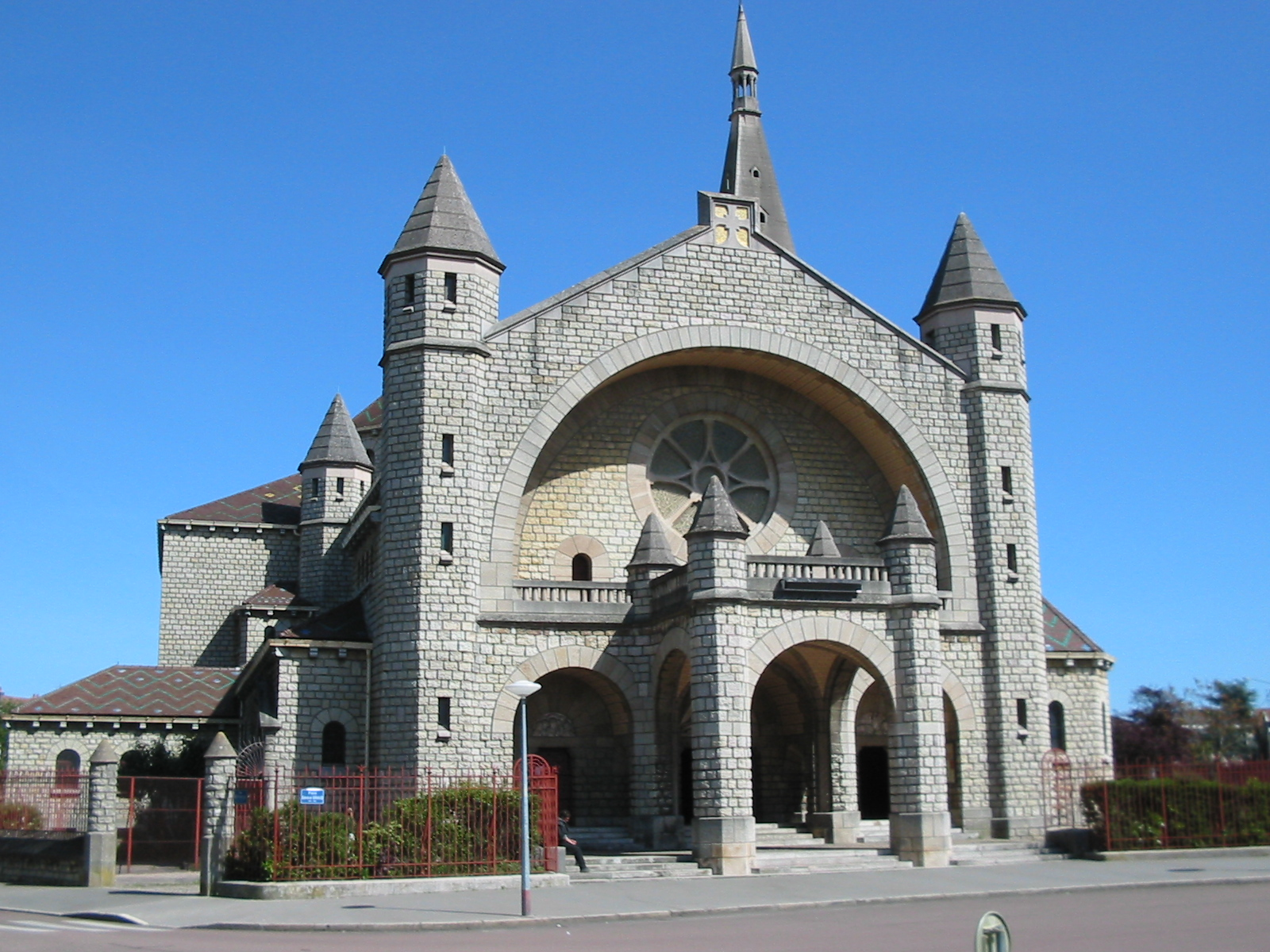 Extérieur du sacré-cœur de Dijon